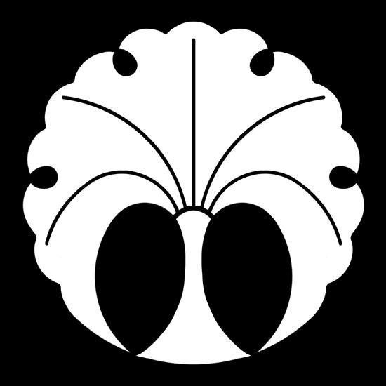 「立銀杏の丸」紋（染抜）